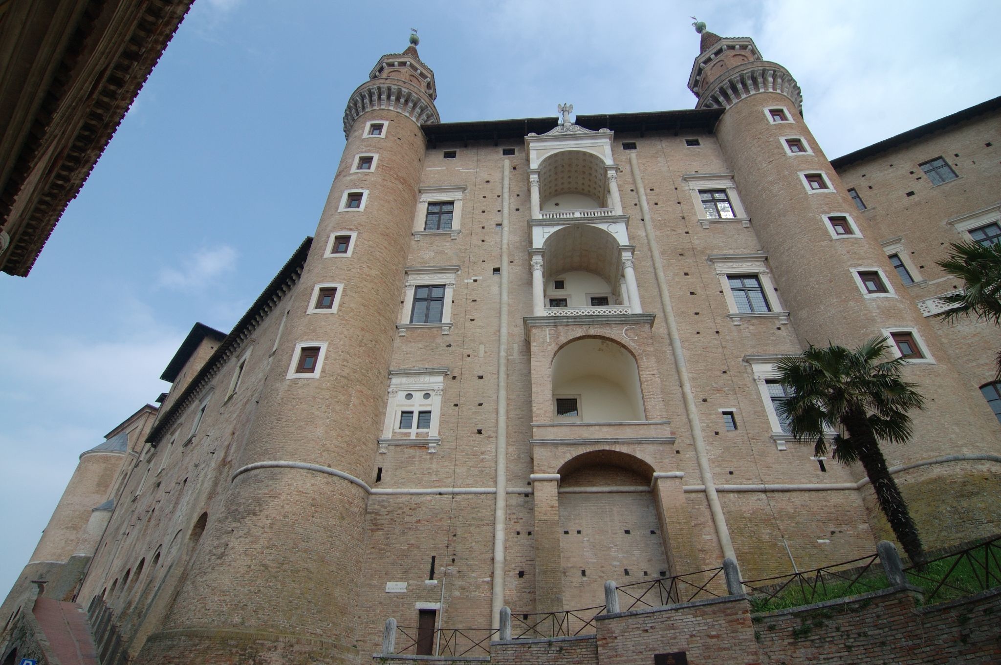 Urbino, Marche, Italia